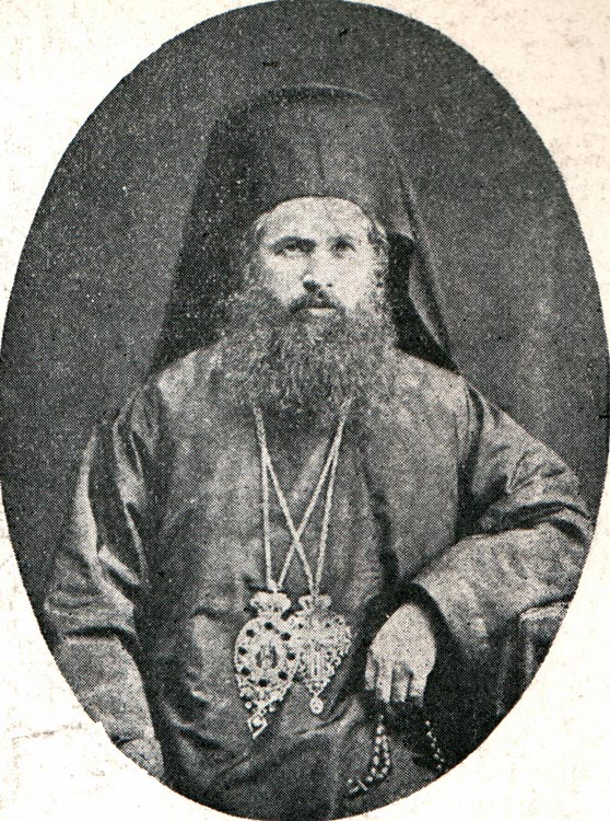 Мелетий Софийски (1832 - 1891).